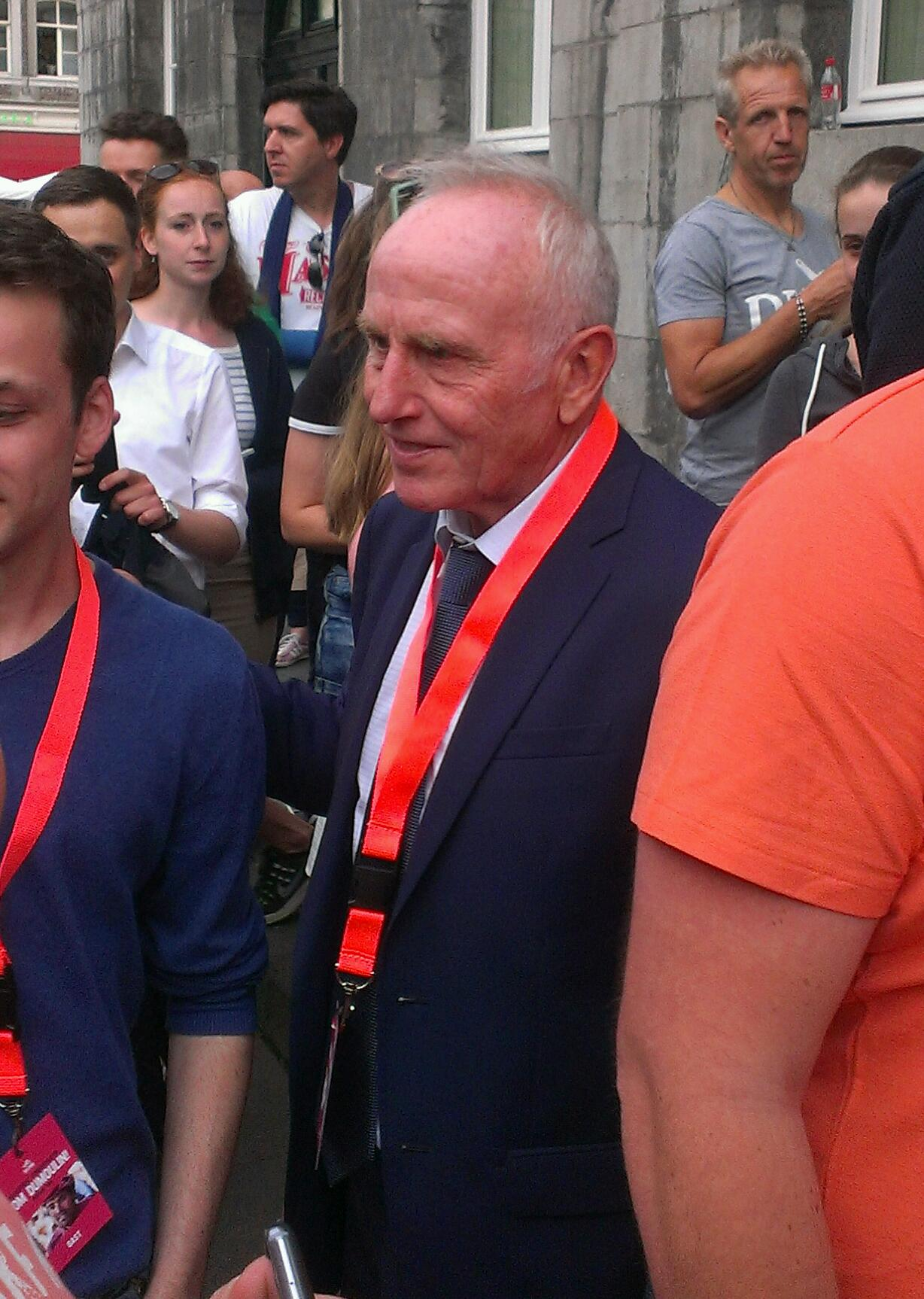 Tour-winnaar Joop Zoetemelk bij de huldiging van Giro-winnaar Tom Dumoulin op de Markt in Maastricht op woensdag 31 mei 2017.